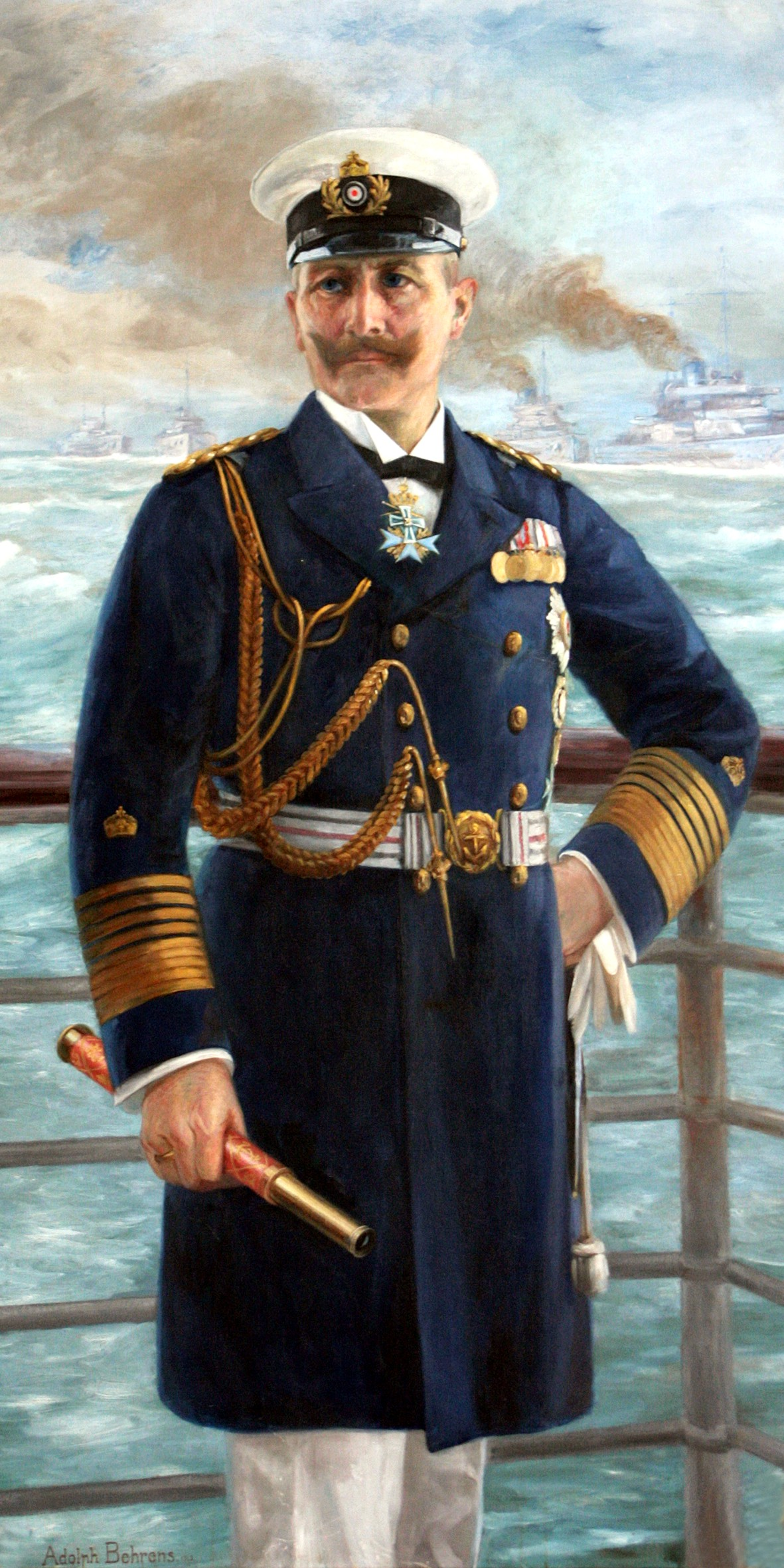 Ölgemälde von Kaiser Wilhelm II. als Großadmiral. Das Bild hängt im Säulengang der Marineschule Mürwik.